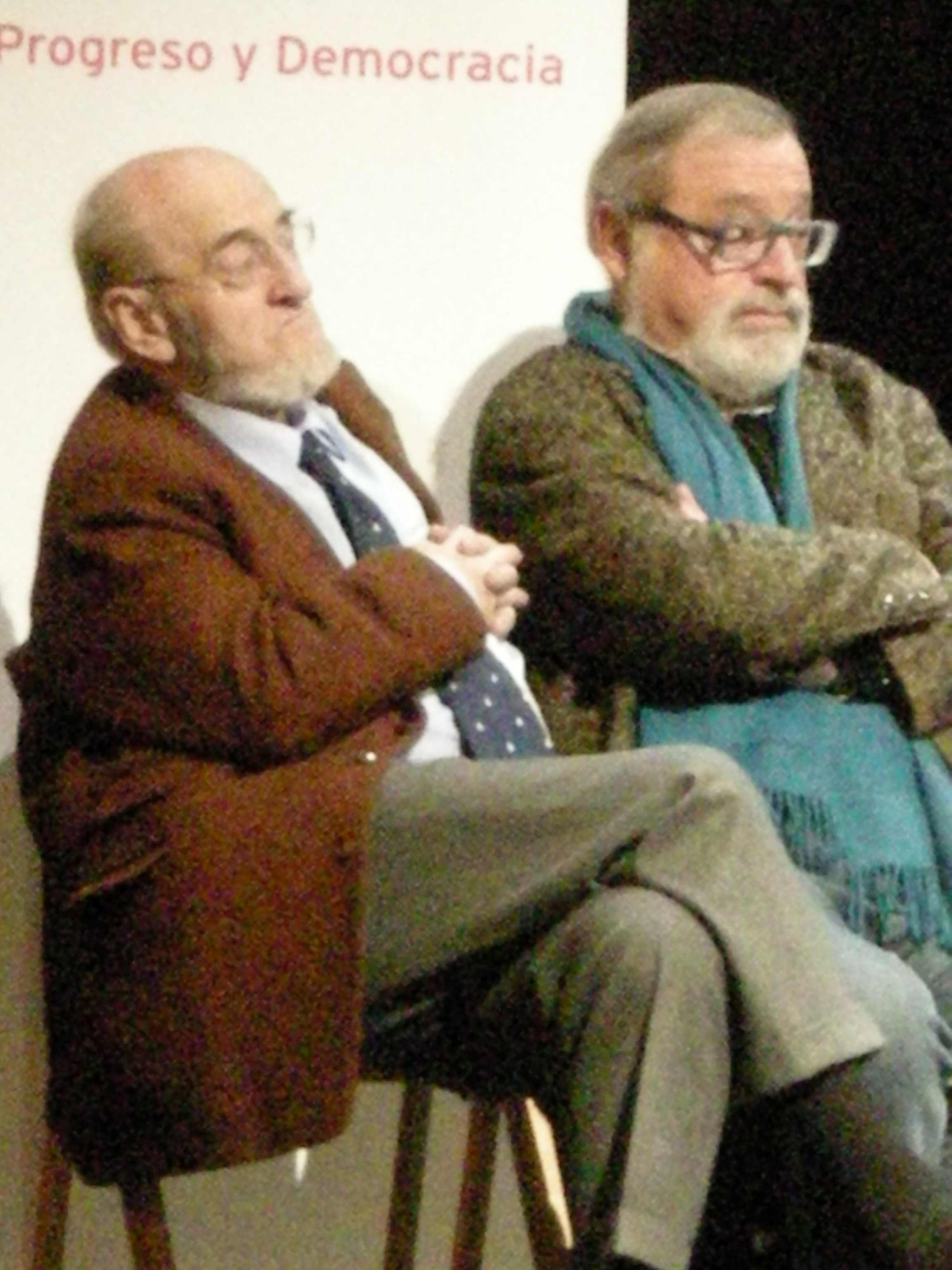 Alvaro Pombo y Fernando Savater en el acto de presentación de candidatos a las elecciones de 2008 de UPyD